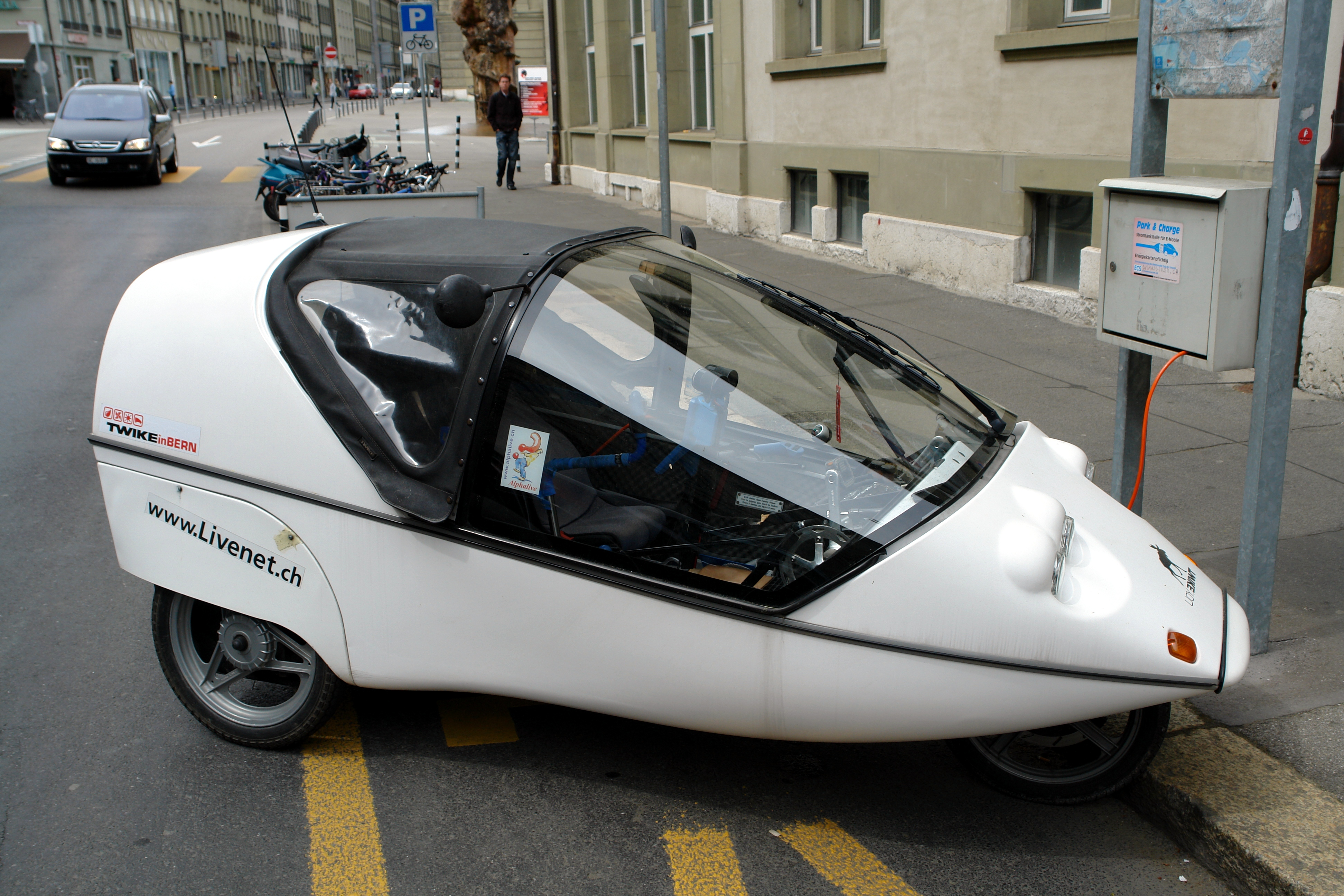 Tricycle à pédales, Berne.